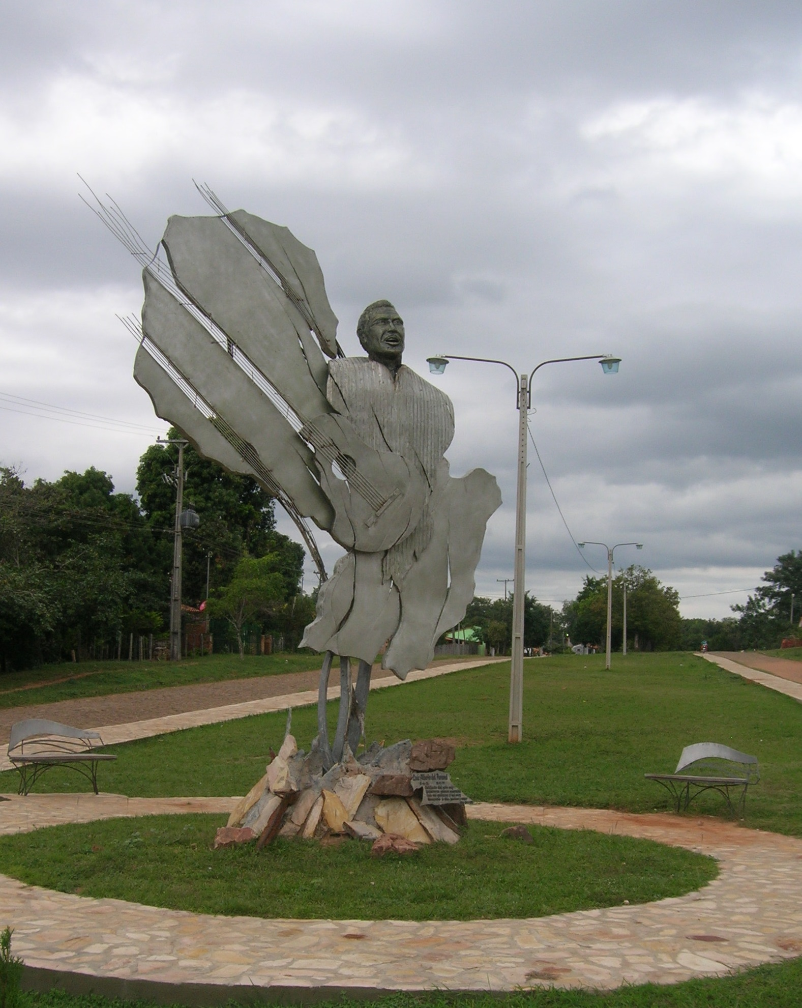 Monumento dedicado a Luis Alberto del Paraná (1926-1974), ubicado en la entrada de su pueblo natal Altos, en el departamento de la Cordillera.